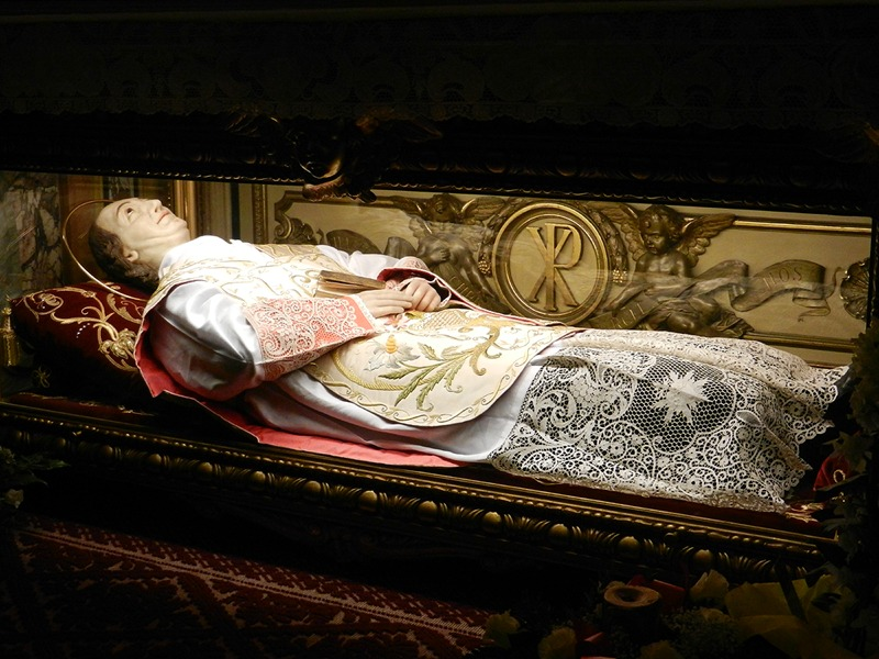 Torino - Tomba di S. Giuseppe Benedetto Cottolengo all'interno della Chiesa dei Ss. Vincenzo de Paoli e Antonio Abate al Cottolengo